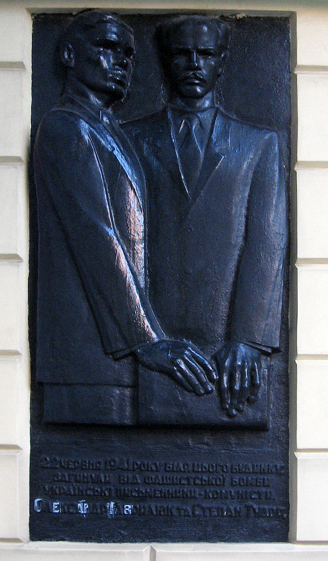 Меморіальна дошка С.Тудору та О.Гаврилюку